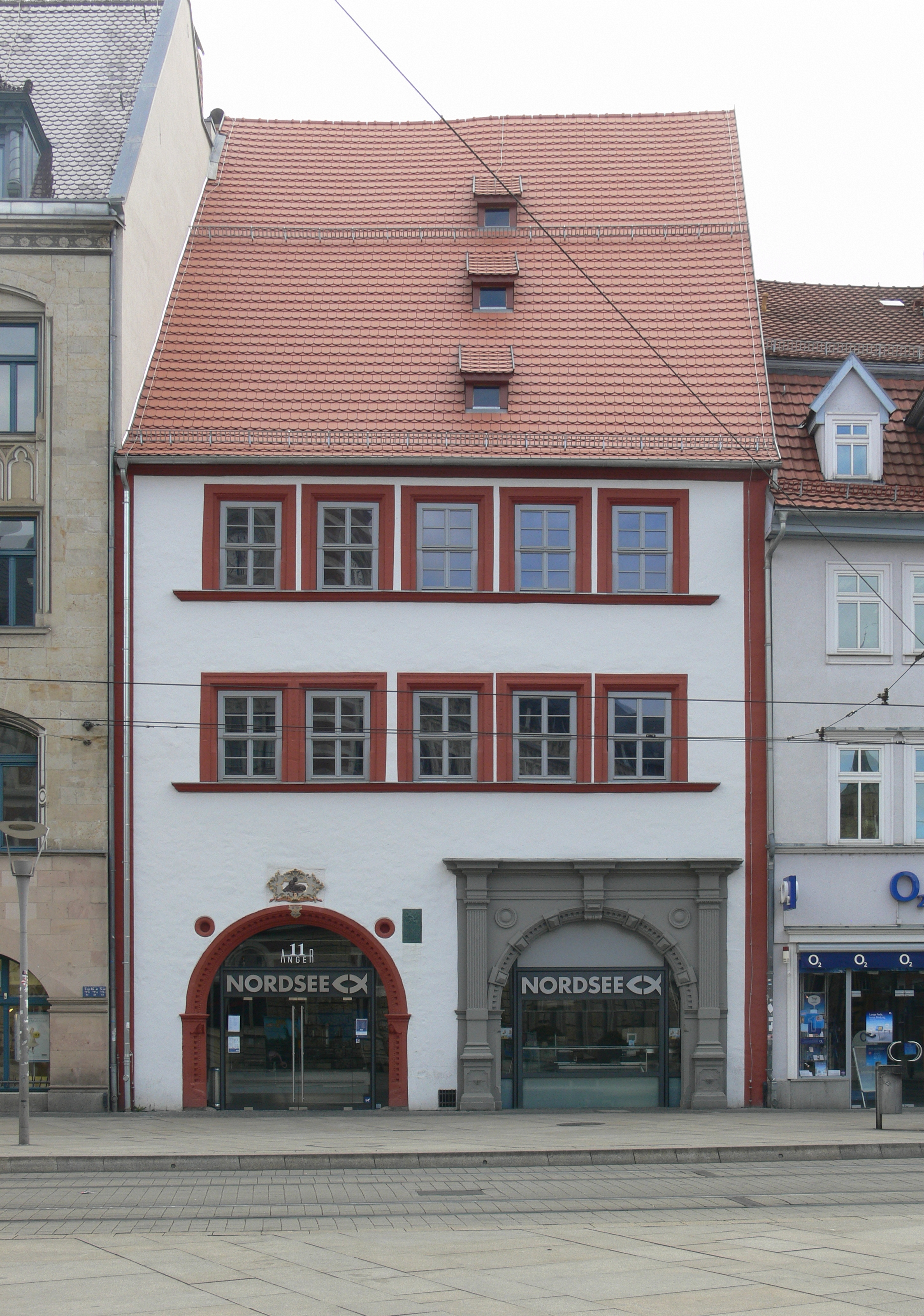 Erfurt, "Haus zum schwarzen Löwen" am Anger